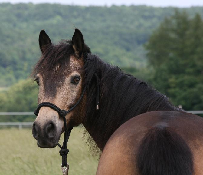 Connemara Wallach